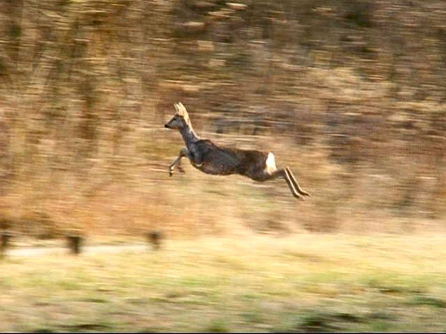 A deer in Esztergom, Hungary (between "Kerektó" and "Búbánatvölgy")